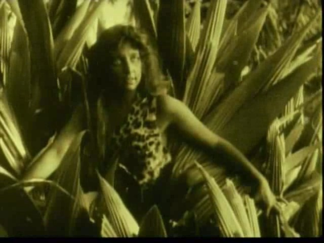 Jane Gail dans 20000 lieues sous les mers (1916) de Stuart Paton